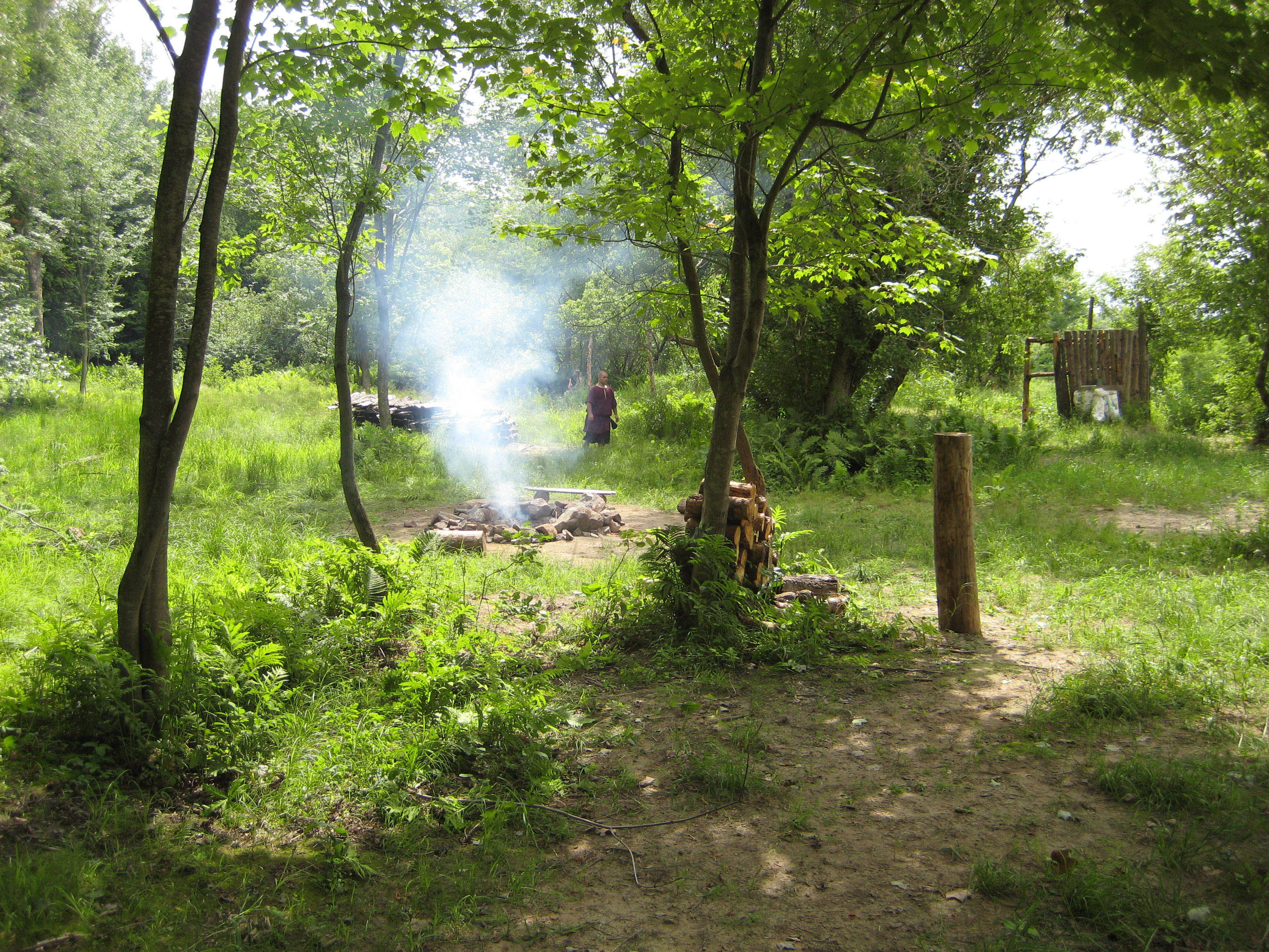 Photos d'un paysage du terrain des Terres de Bélénos